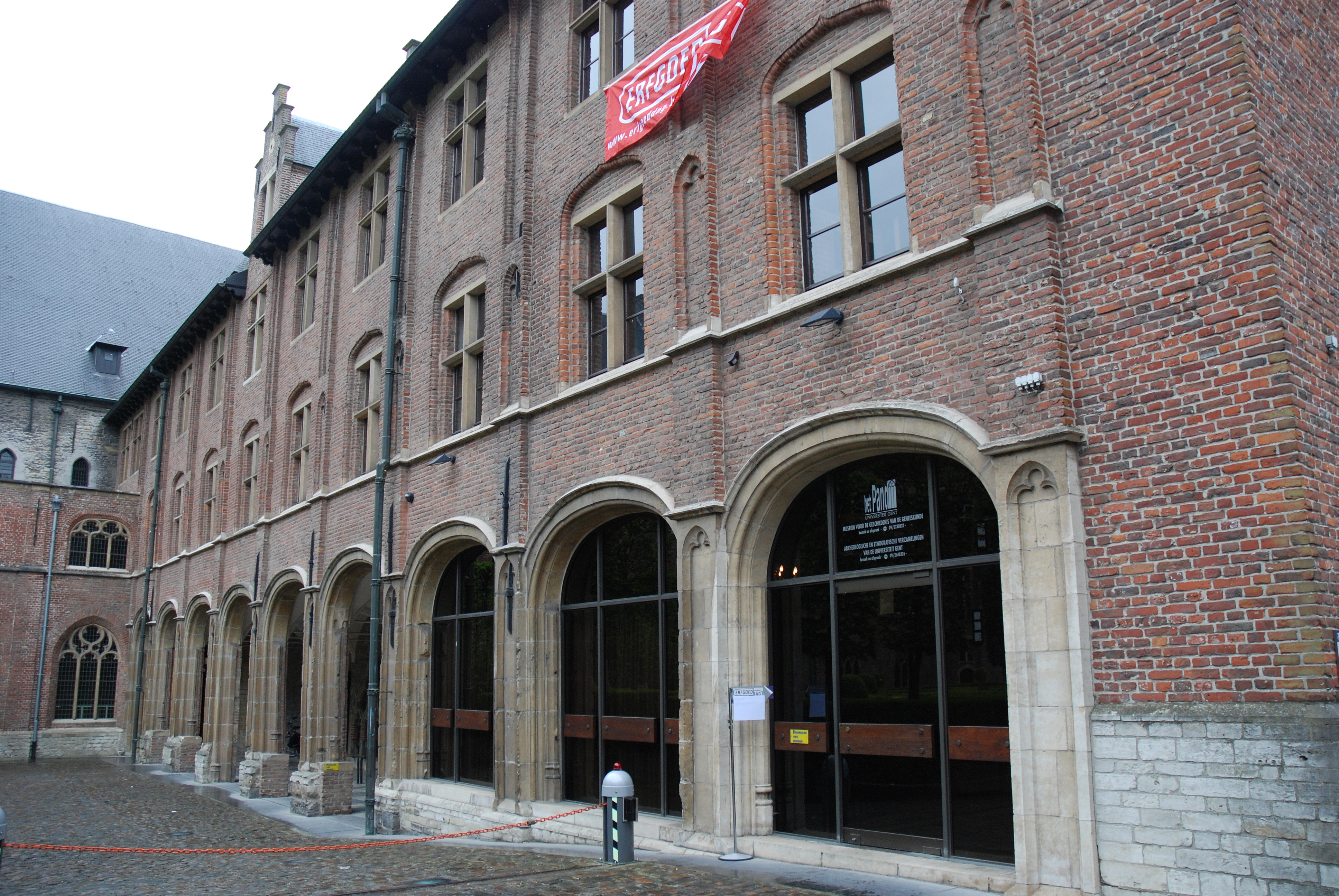 Middenvleugel van Het Pand, voormalige dominicanenklooster in Gent, België, waar nu het Museum voor de Geschiedenis van de Geneeskunde is ondergebracht